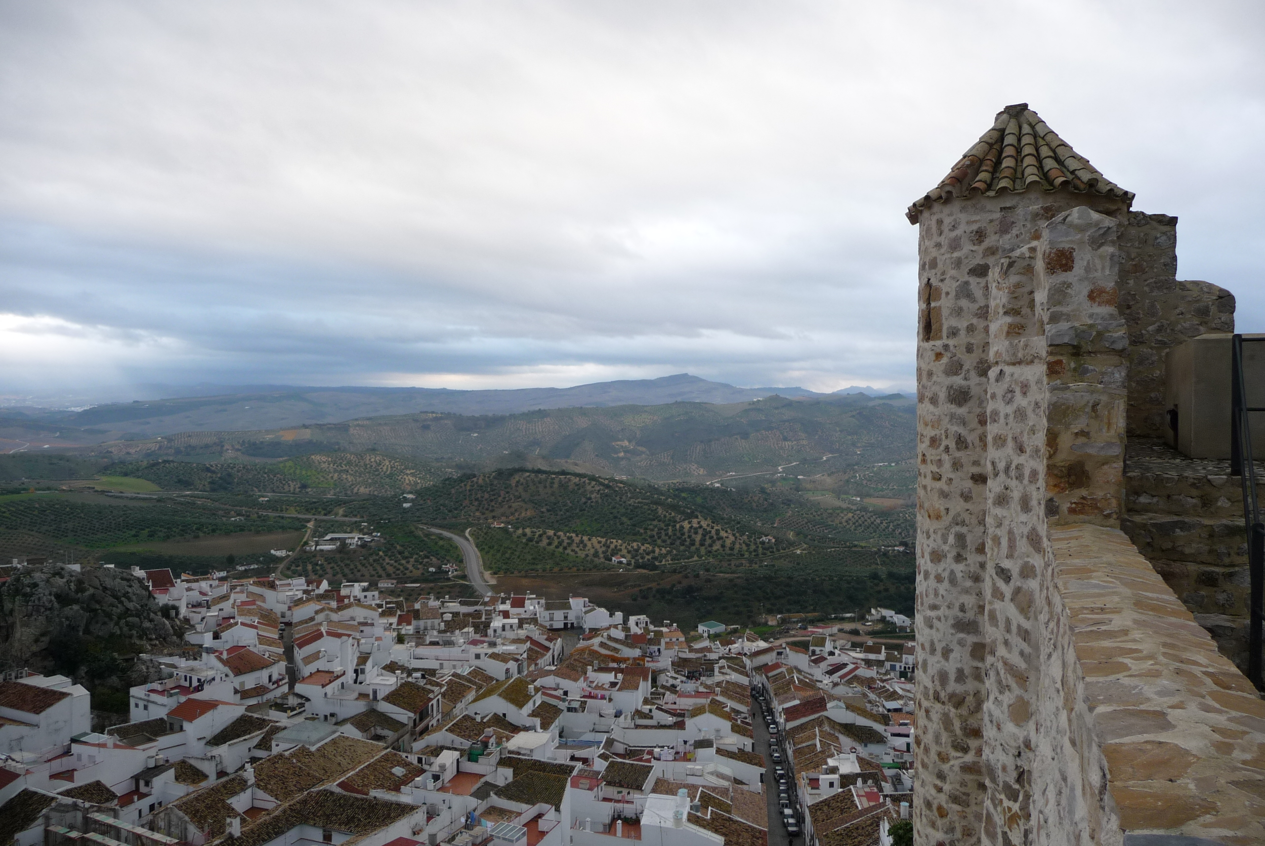 Olvera (Andalusia, Spain).